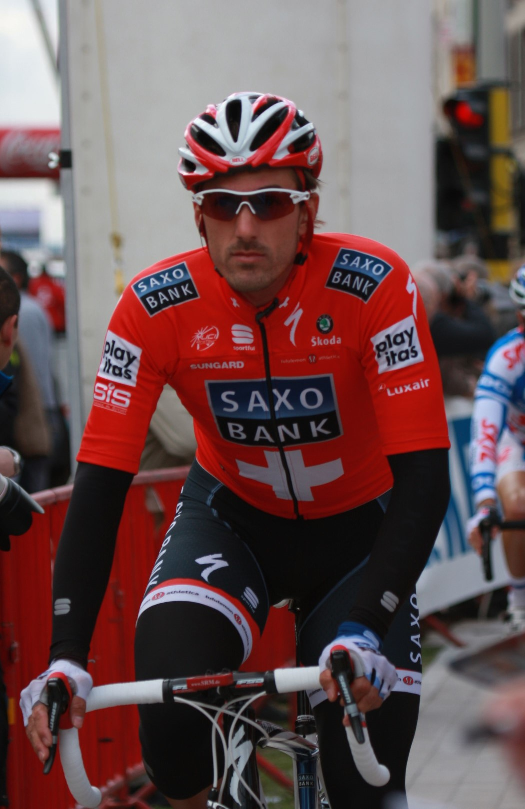 cancellara1